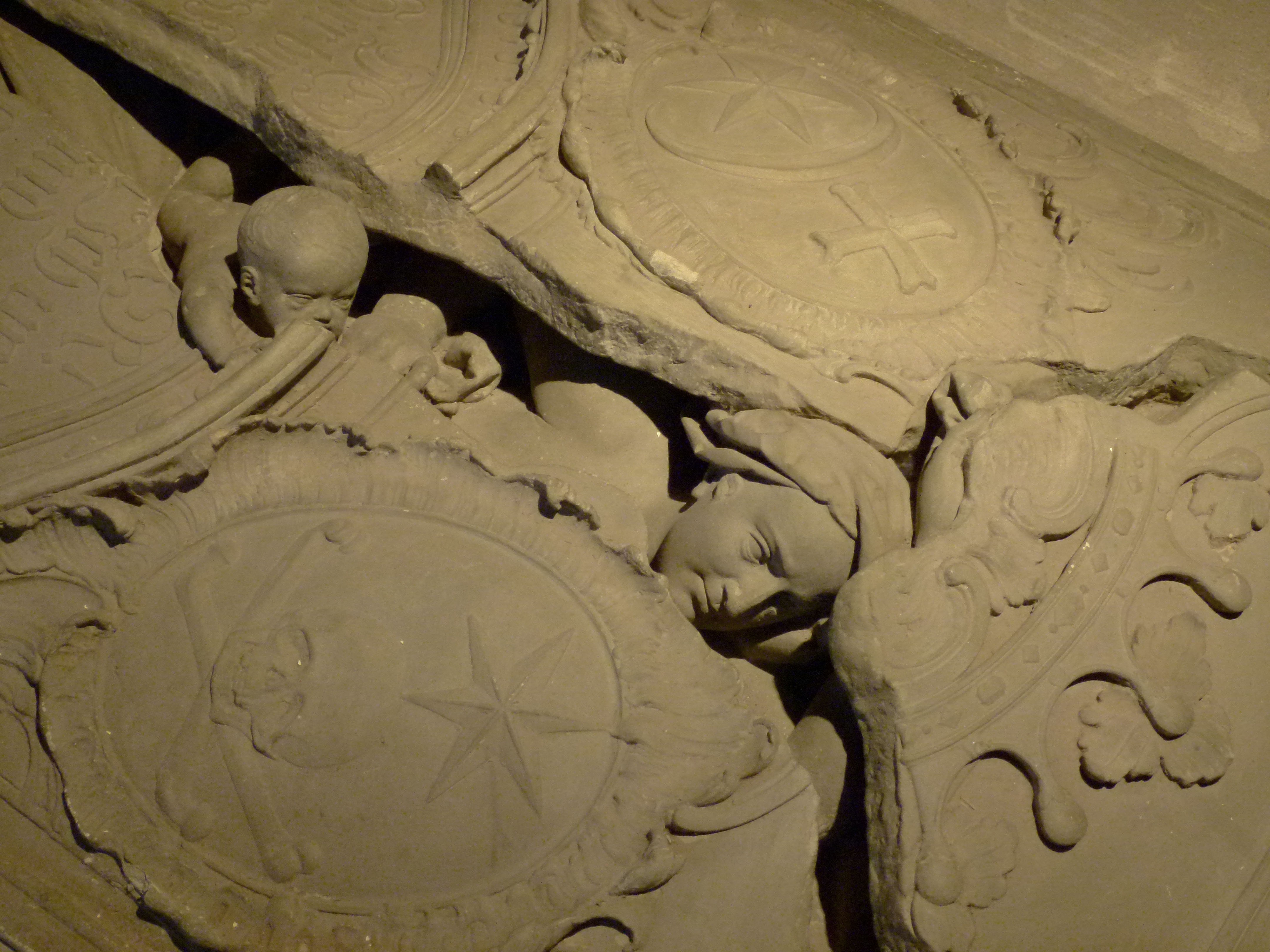 Detail aus dem Grabmal der Pfarrersfrau von Hindelbank Maria Magdalena Langhans. Am jüngsten Tag sprengt sie mit erhobenem Arm die Steinplatte in drei Teile und kommt mit ihrem Kind lebend aus dem Grab. Spontanes Werk des Bildhauers Johann August Nahl, Gast im Pfarrhaus während der Arbeit am Grabmal von Hironimus v.Erlach